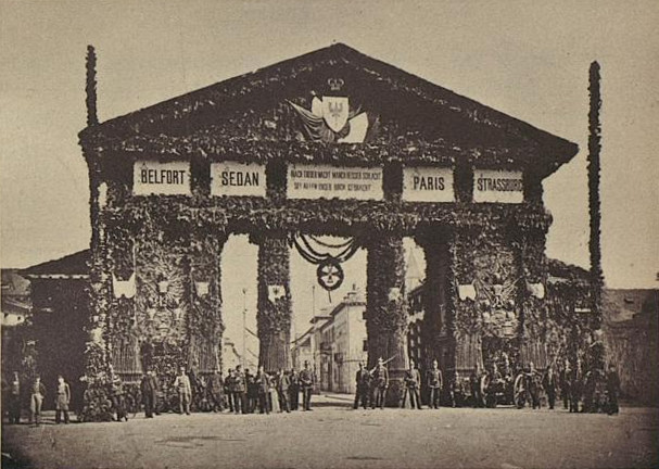 Das Ettlinger Tor geschmückt zum Einzug der siegreichen Truppen 1871. Es war eines von ehemals sechs Stadttoren von Karlsruhe